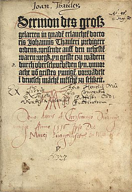 Titelblatt der Editio princeps der Predigten von Johannes Tauler, Druck: Konrad Kachelofen, Leipzig 17. März 1498; Universitätsbibliothek Leipzig, Off. Lips. Ka. 34. GW M45246